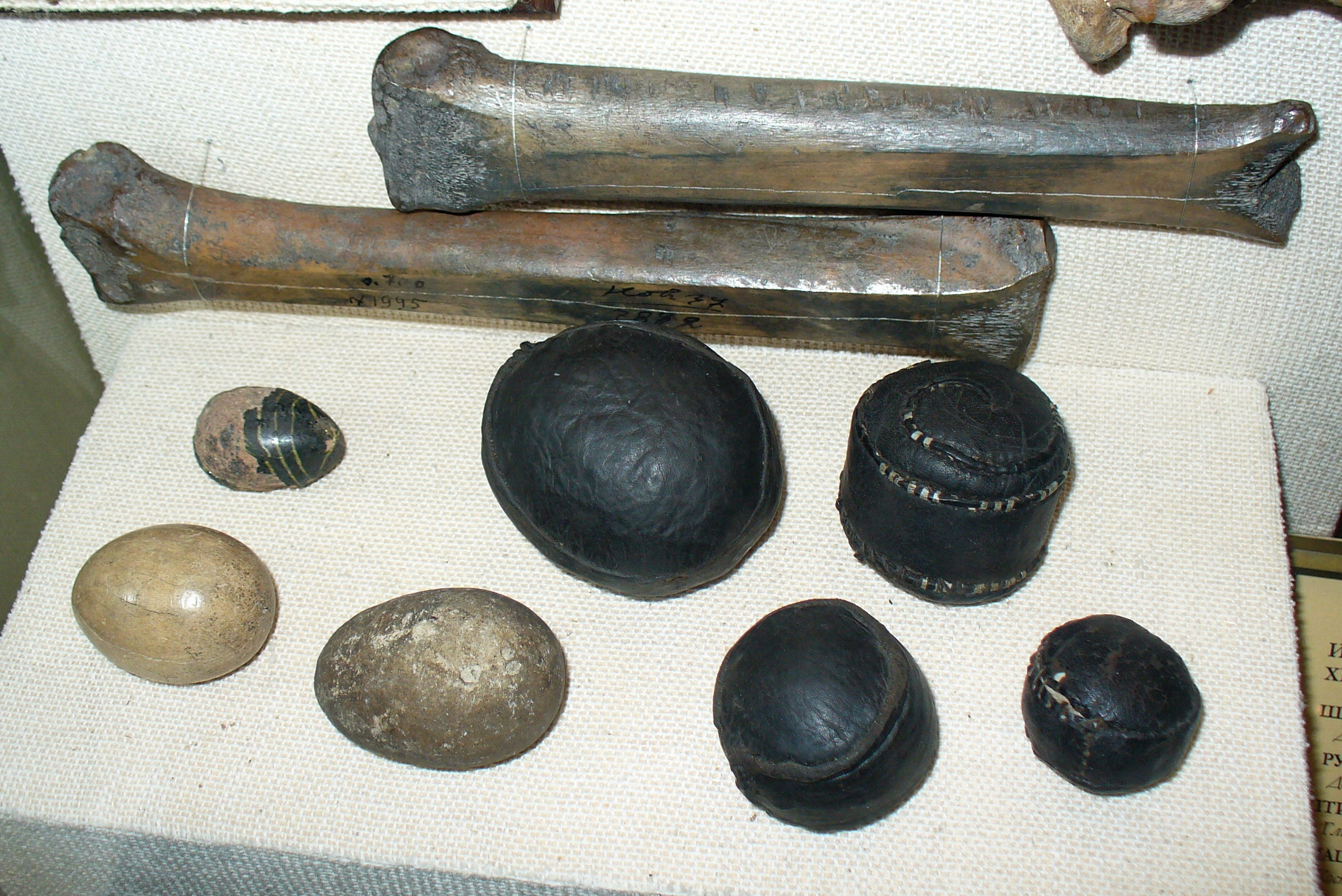 Коньки (кость). Яйца-погремушки (глина). Мячи (кожа) - Новгород, Смоленск, Вщиж. Русь, XII - п.пол. XIII века.